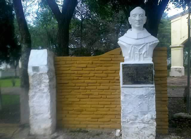 Monumento del Fundador de Itapé Fray Buenaventura de Villasboa